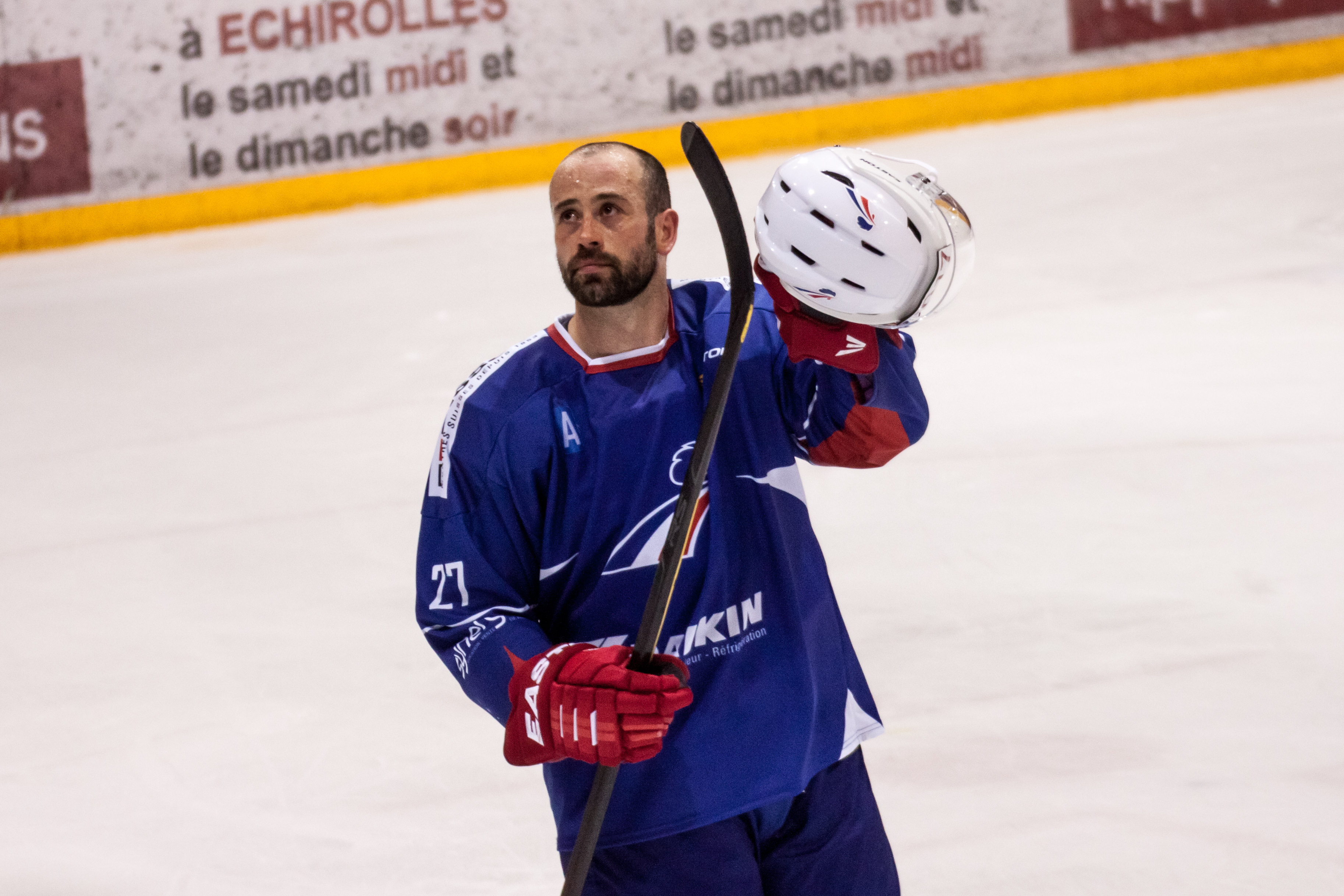 Baptiste Amar lors du match France-Slovaquie le 19 avril 2014 à Grenoble.